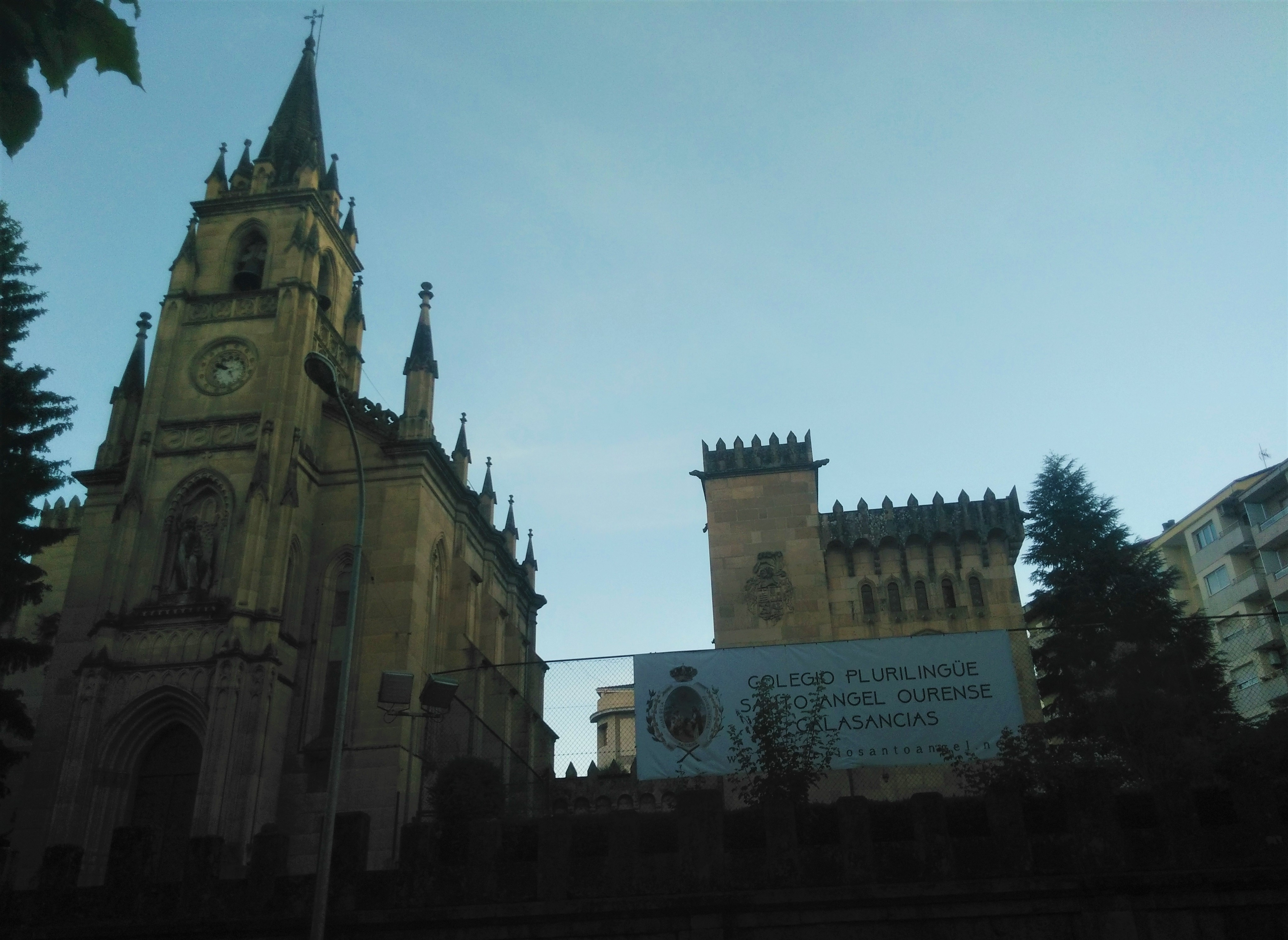 Colegio Plurilingüe Santo Ángel, perteneciente al Instituto Calasancio.